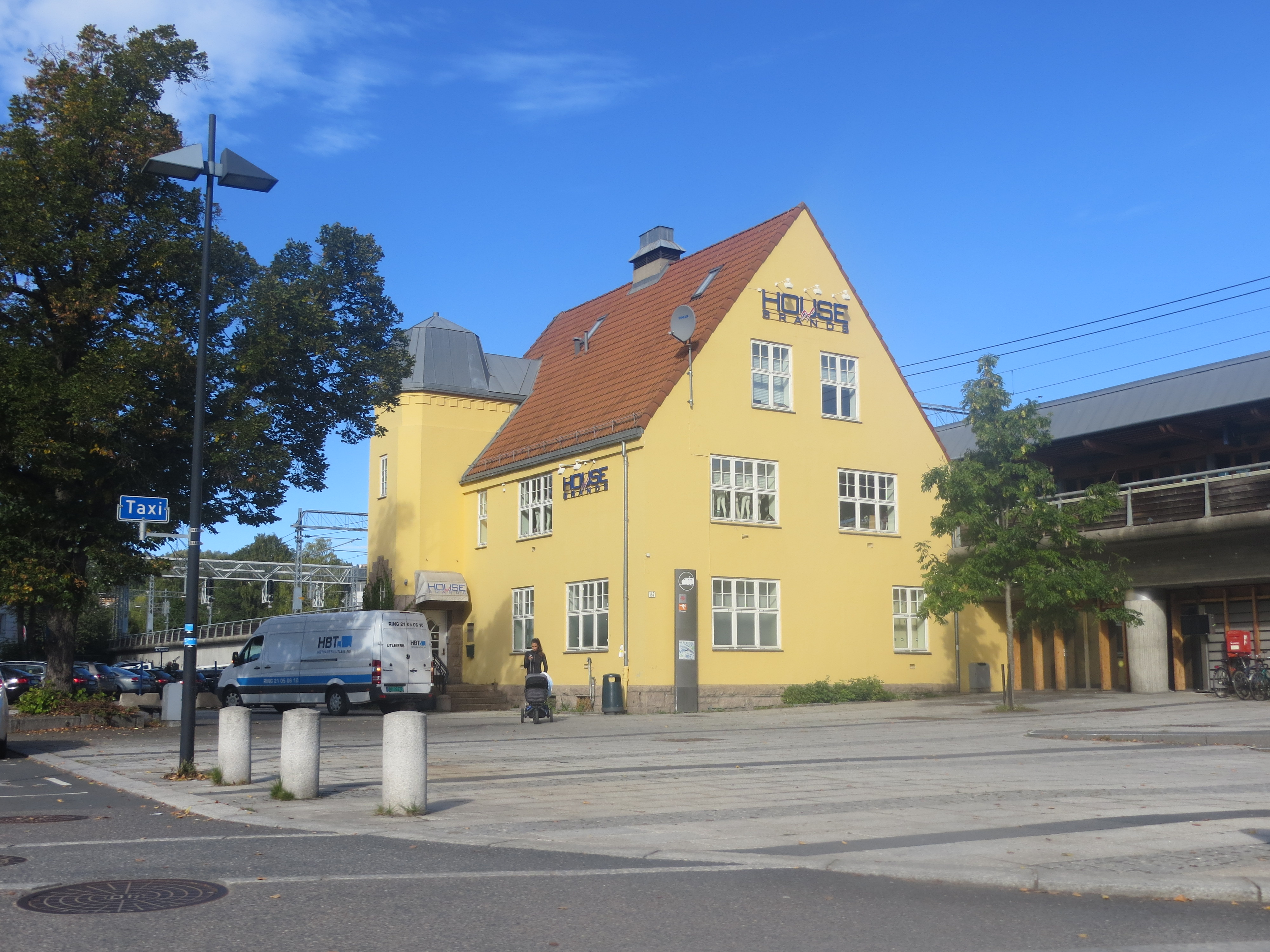 Skøyen Stasjon, Oslo